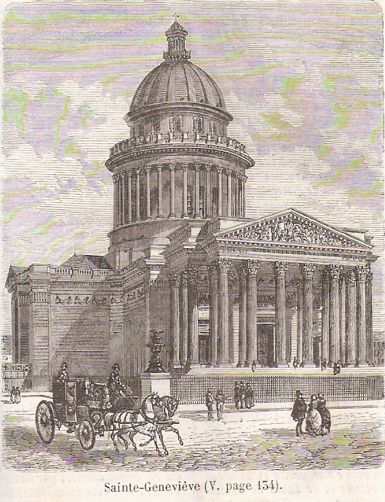 L'Eglise Sainte-Geneviève (Panthéon) en 1867.